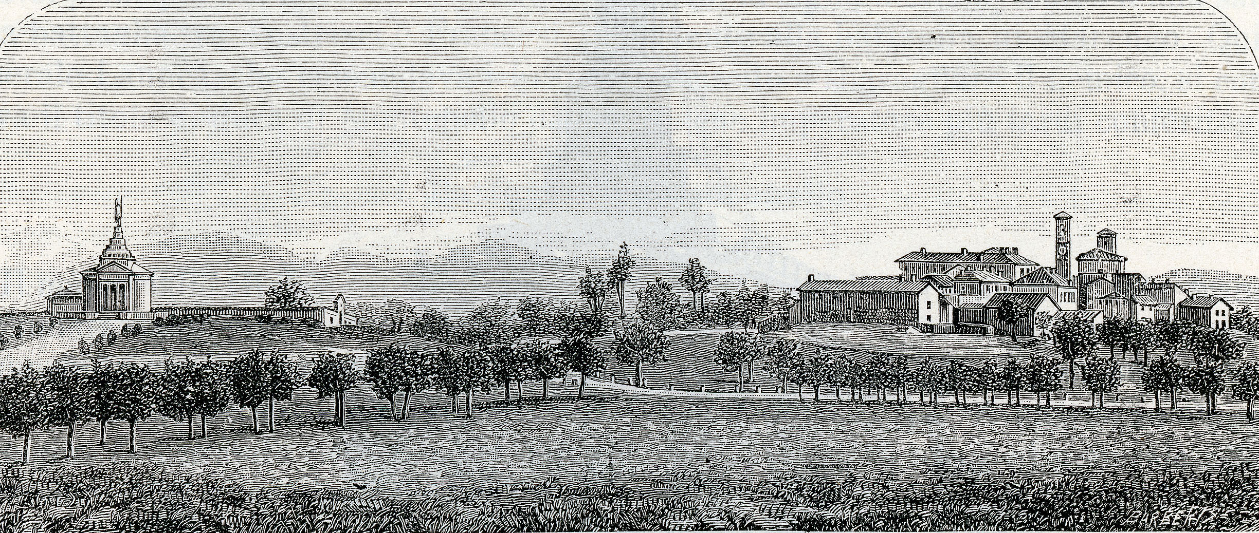 Montebello: veduta del paese presa da nord-ovest (xilografia di Barberis).